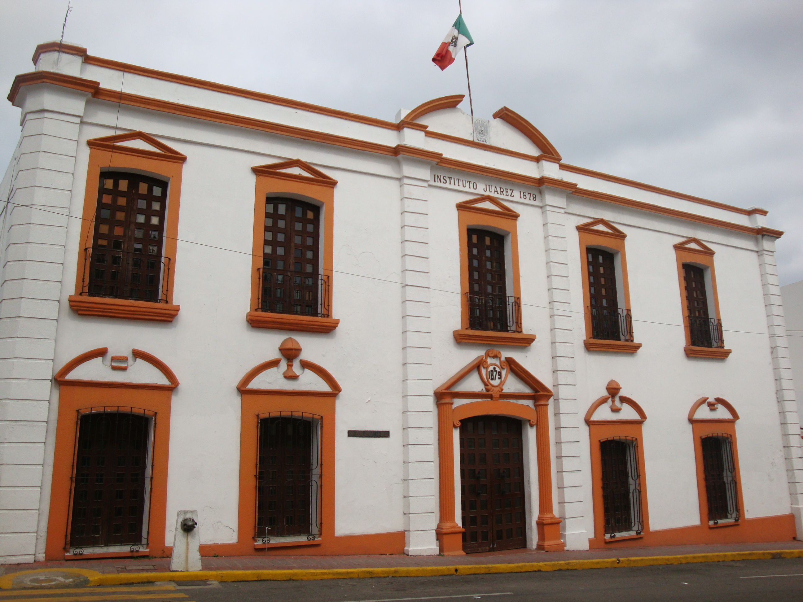 Edificio del antíguo Instituto Juárez fundado en 1879 por el gobernador Simón Sarlat Nova, siendo el primer centro de estudios superiores en Tabasco. Desde 1958 se convirtió en la Universidad Juárez de Tabasco, hoy Universidad Juárez Autónoma de Tabasco. En el edificio se localiza hoy la Dirección de difusión cultural y extensión universitaria de la UJAT. Ciudad de Villahermosa, estado de Tabasco, México.